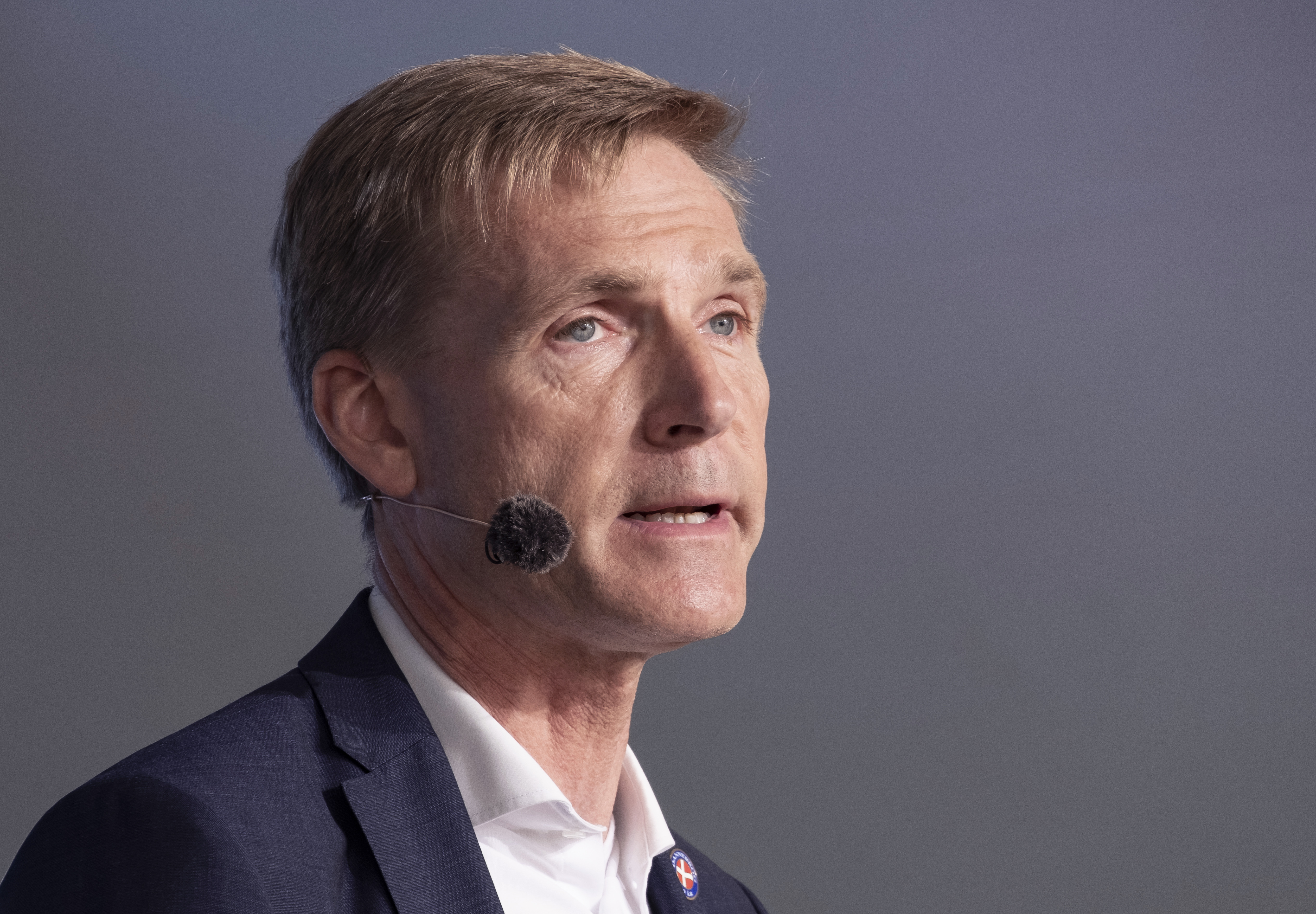 20190615. Folkemødet i Allinge på Bornholm. Dansk Folkepartis ledare Kristian Thulesen Dahl vid sitt partiledartal. Photo: News Øresund - Johan Wessman © News Øresund - Johan Wessman (CC BY 3.0). Detta verk av News Øresund är licensierat under en Creative Commons Erkännande 3.0 Unported-licens (CC BY 3.0). Bilden får fritt publiceras under förutsättning att källa anges. .The picture can be used freely under the prerequisite that the source is given. News Øresund, Malmö, Sweden News Øresund är en oberoende regional nyhetsbyrå som är en del av det oberoende dansk-svenska kunskapscentrat Øresundsinstituttet.. .